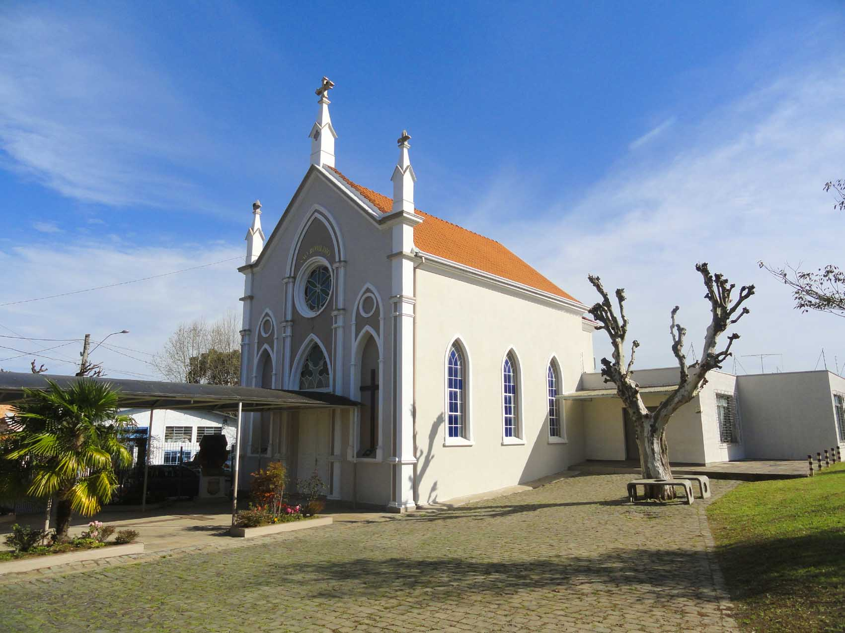 Igreja de São Romédio, erguida entre 1931-1933, Caxias do Sul